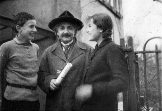 Albert Einstein met Paul jr. en Galinka Ehrenfest voor hun huis in Leiden